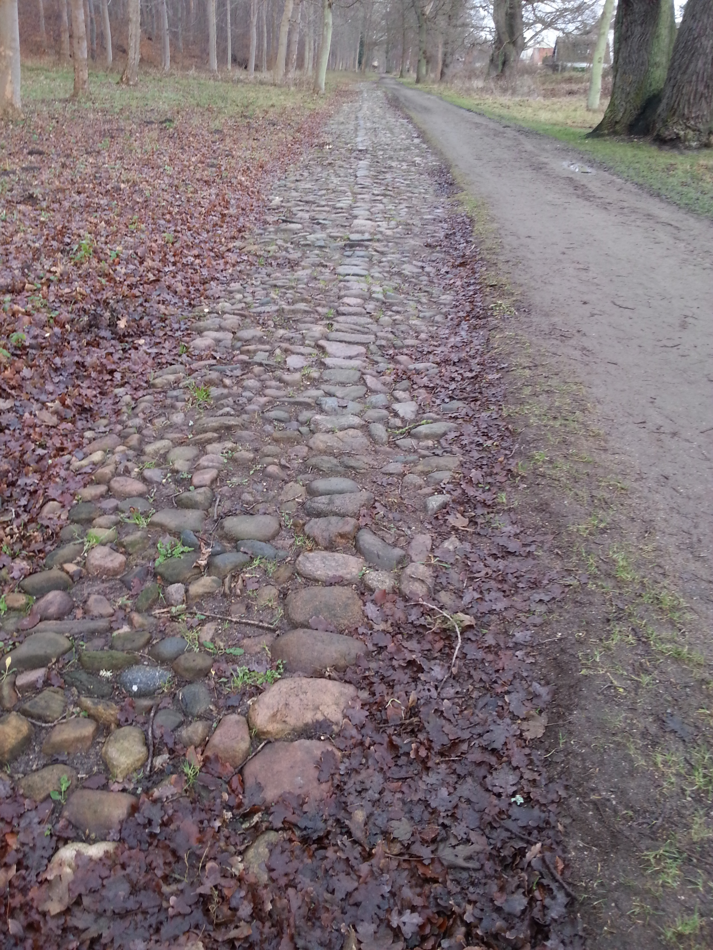 Parti af Strandvejen i Egebæksvang